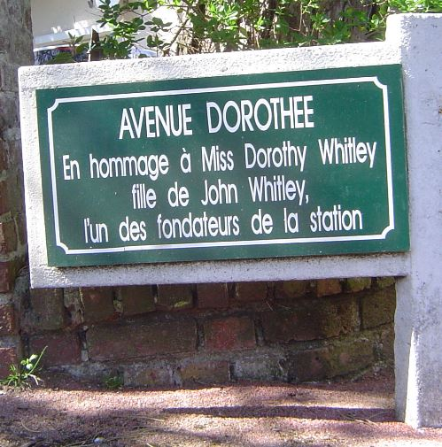 Plaque de l'avenue Dorothée au Touquet-Paris-Plage